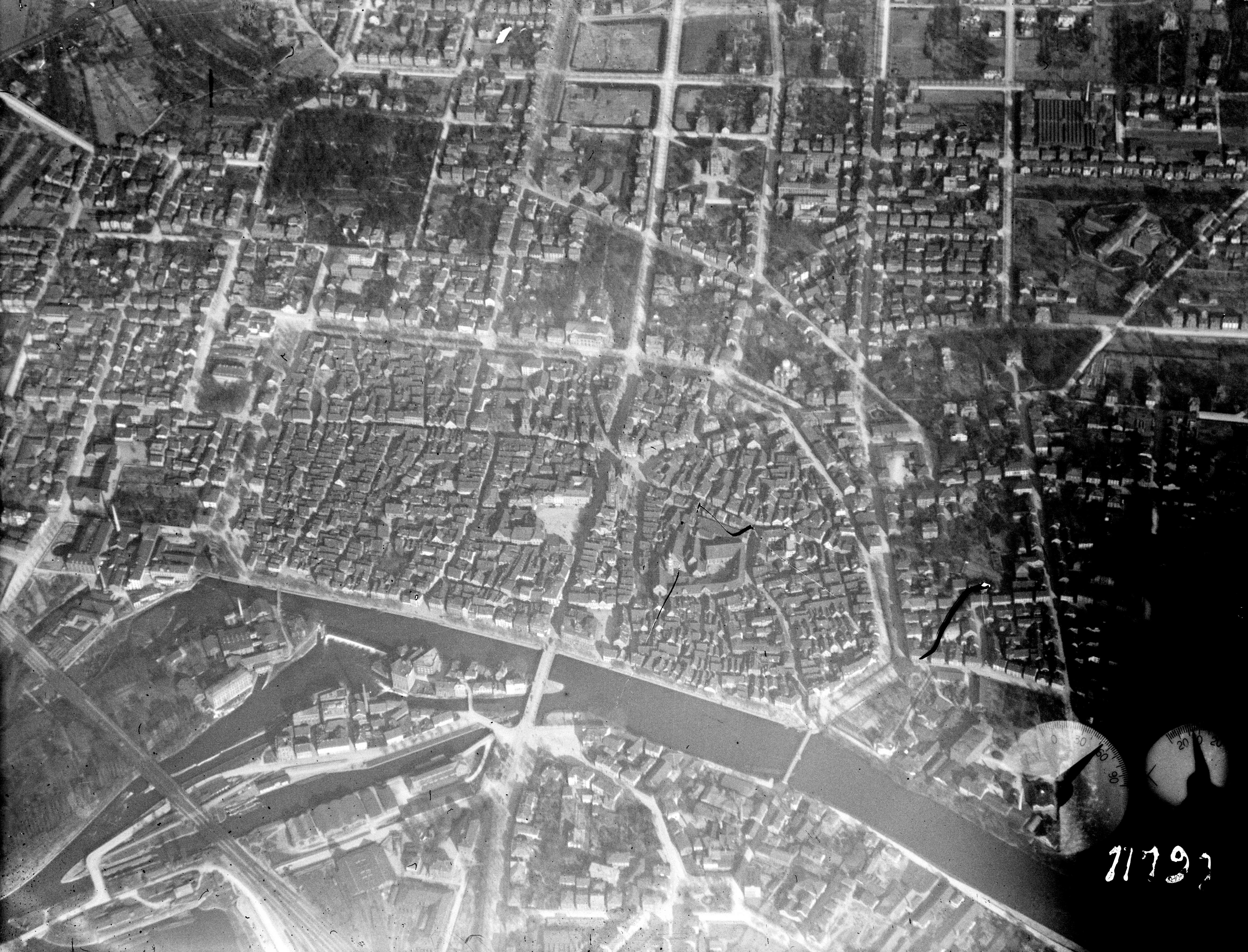 Luftbild von Heilbronn im Jahr 1918, vermutlich zu militärischen Zwecken aufgenommen. In der Bildmitte die Heilbronner Altstadt, oben links der Alte Friedhof, oben mittig die Friedenskirche, oben rechts das Heilbronner Gefängnis. Links unten die Neckarinseln Hospitalgrün, Hefenweiler und Kraneninsel, darunter der Wilhelmskanal. Ganz unten links am Bildrand ein kleiner Teil des Winterhafens, rechts davon das Heilbronner Bahnbetriebswerk.